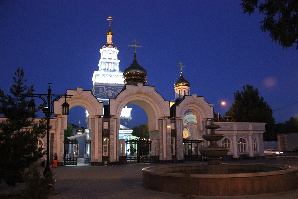 Ташкент Успенский кафедральный собор.